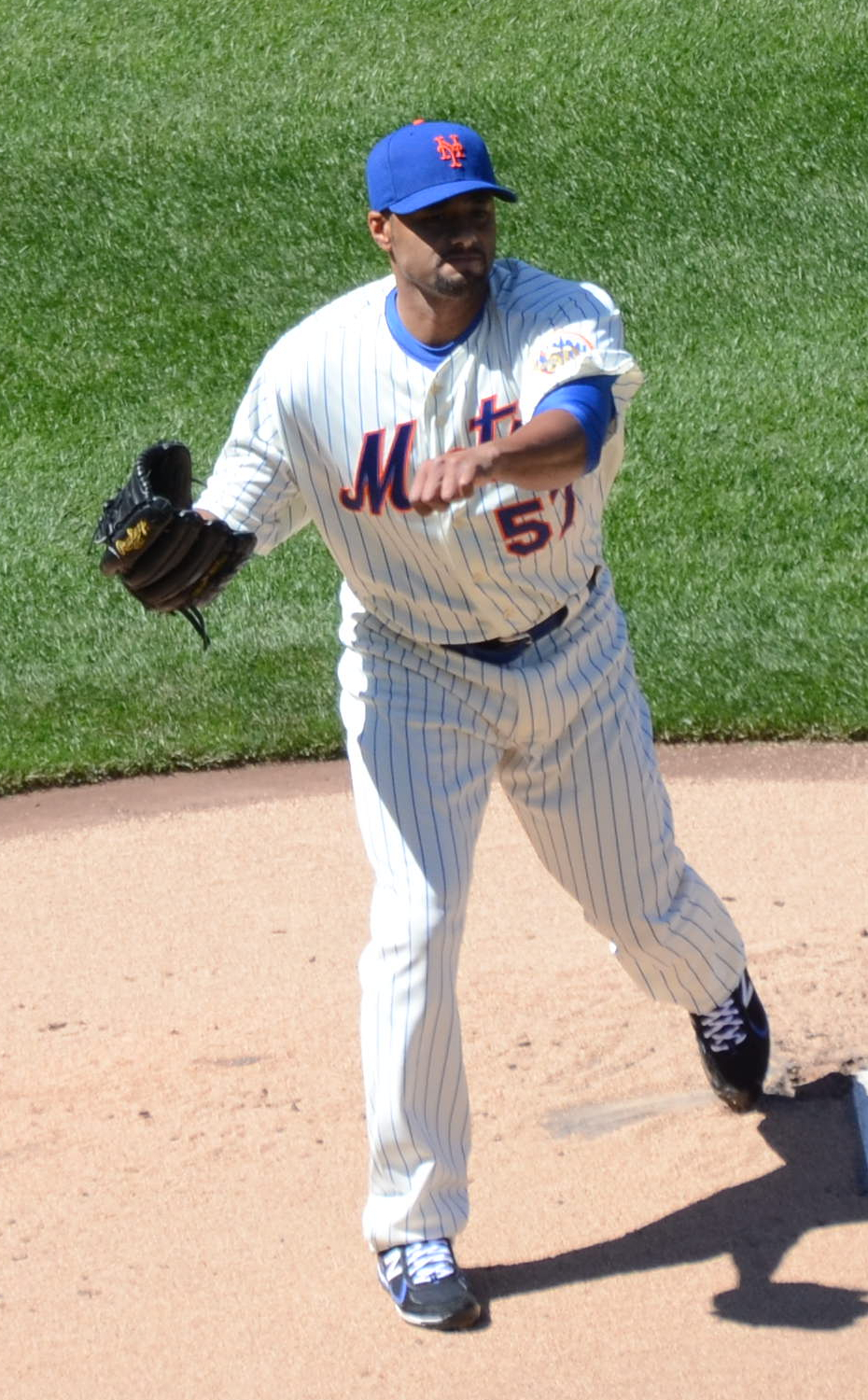 Johan Santana